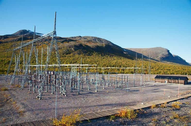 Vietas kraftverk, ställverket. Laponia världsarv. Motiv: Stora Sjöfallet (Stour Muorkkegårttje) Nyckelord: Riksintressen, Världsarv Kategori: Kraftverk, NationalparkVietas kraftverk, ställverket. Laponia världsarv.